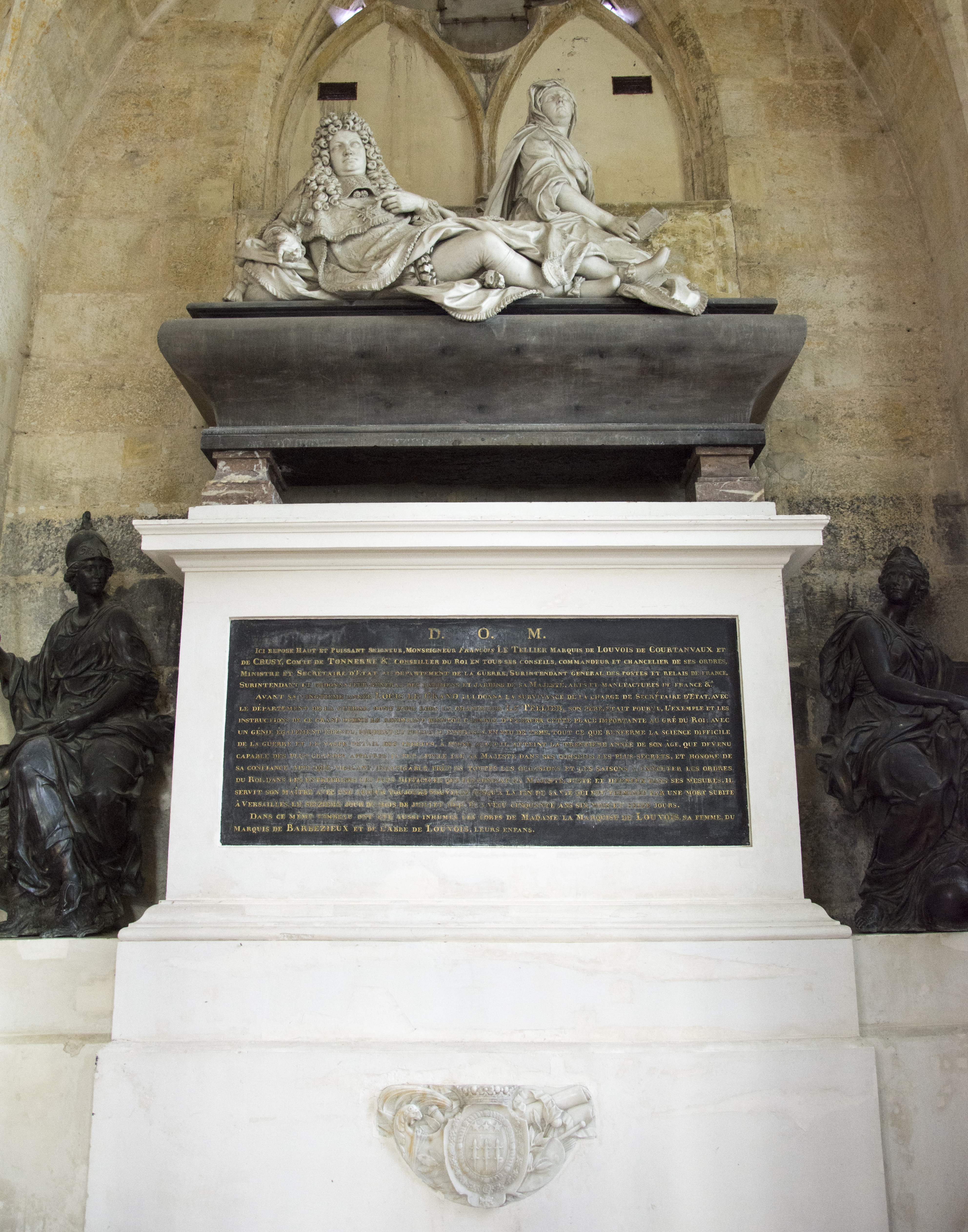 François Girardon (Français, 1628-1715) et Martin Desjardins (van den Bogaert, Français d'origine néérlandaise, 1637-1694): Tombeau de François Michel Le Tellier (1641-1691), marquis de Louvois, et de son épouse Anne de Souvré, Hôtel-Dieu de Tonnerre, Yonne, France.